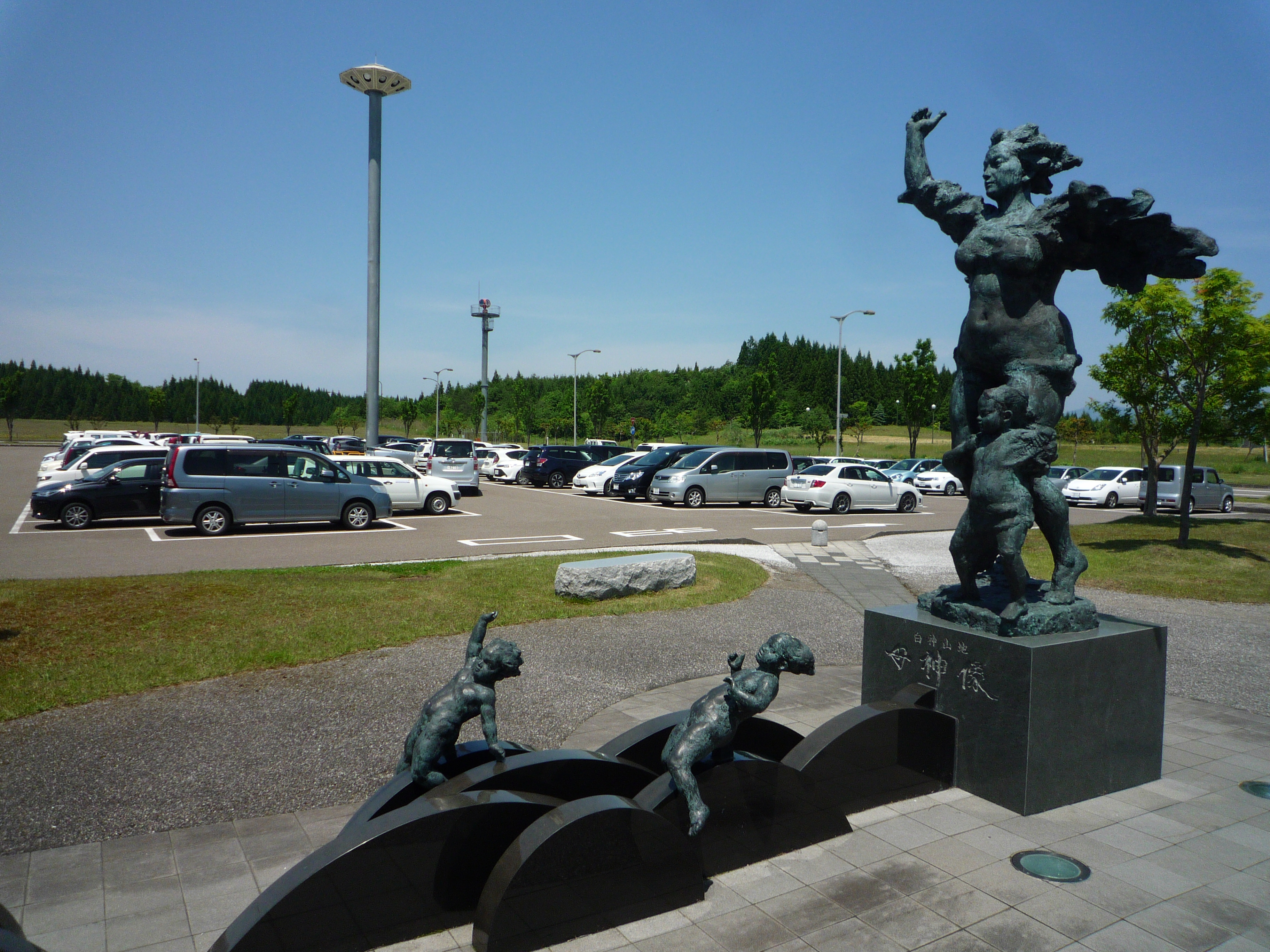 大館能代空港 第2駐車場・シンボルゾーン